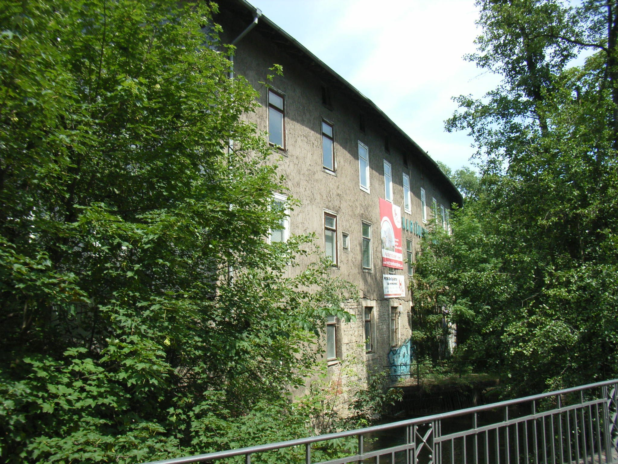 Die am Walkstrom gelegene Kartäusermühle in der Straße des Friedens - Erfurt, Thüringen, Deutschland.]